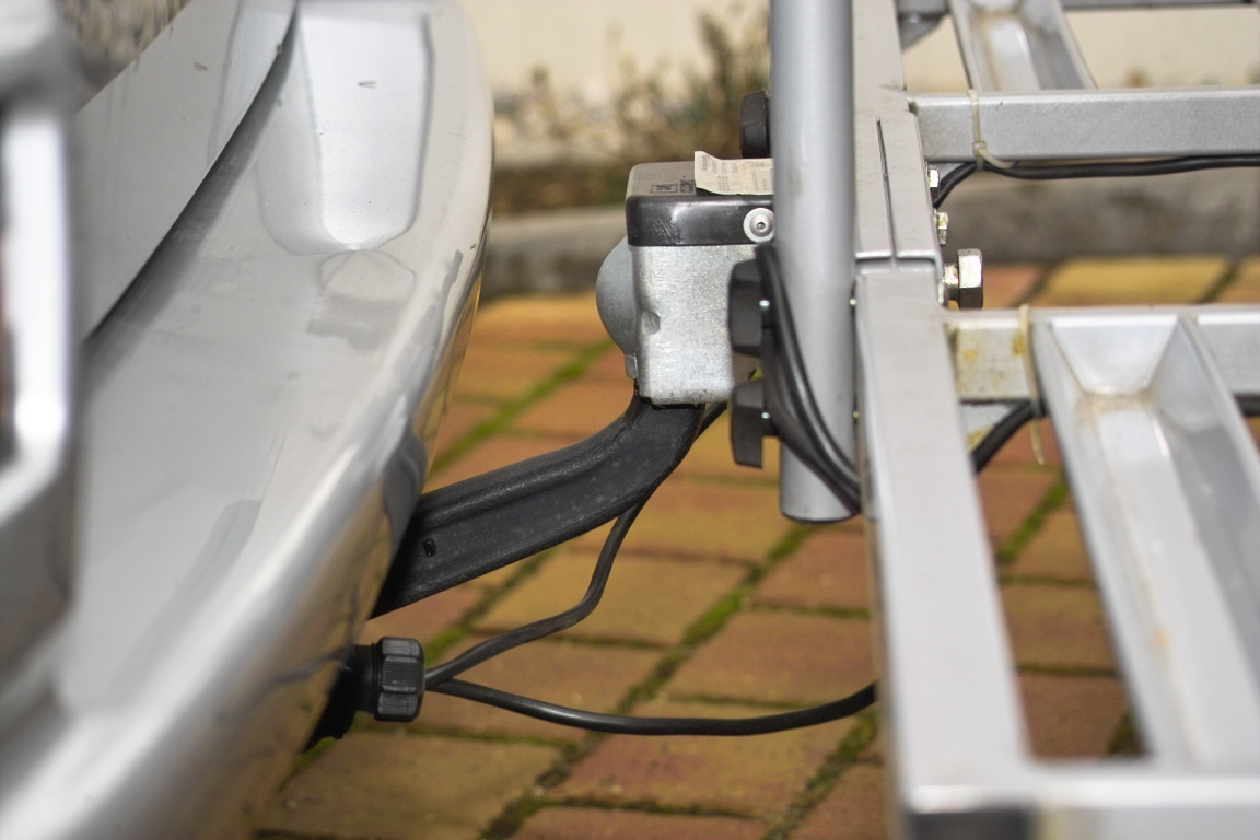 Fahrrad-Träger auf abnehmbarer PKW-Anhänger-Kupplung (montiert an einem VW-Multivan)